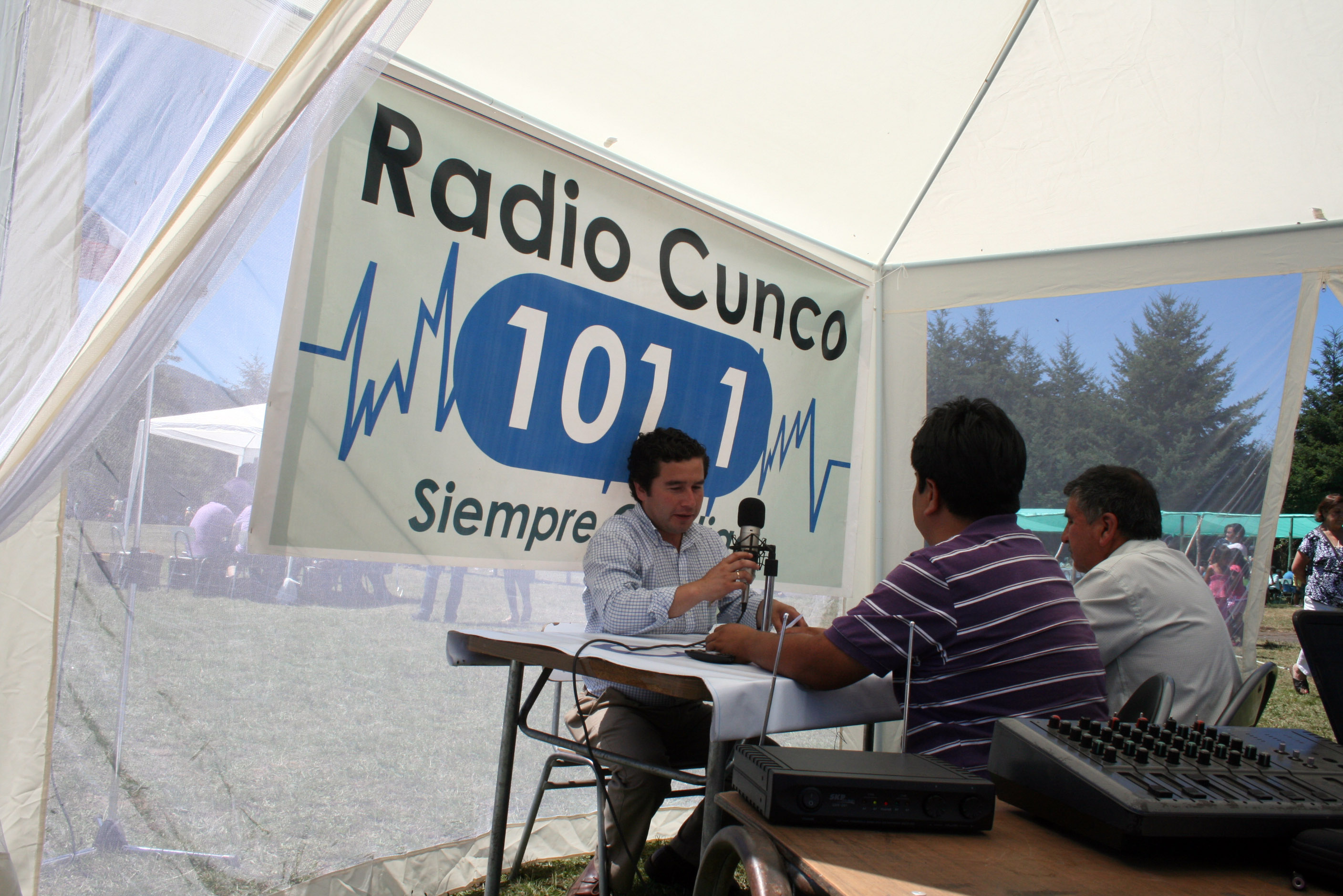 Un móvil de radio Cunco